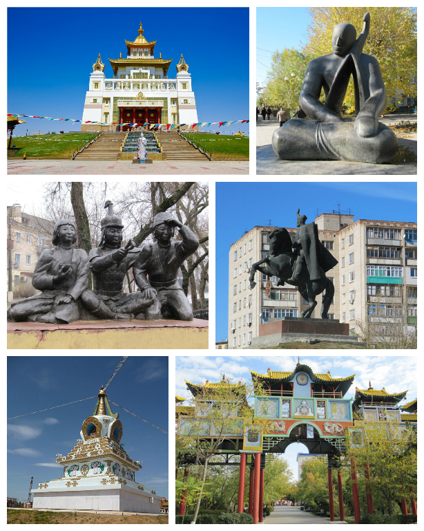 Коллаж - Элиста